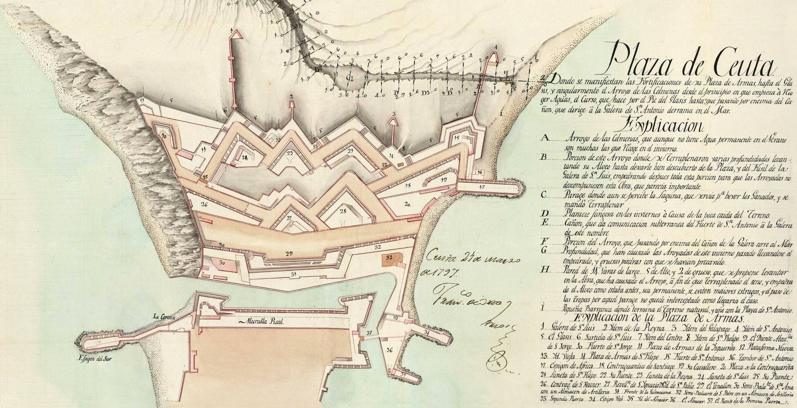 Plano de las Murallas Reales de Ceuta en 1797. Recortado del original